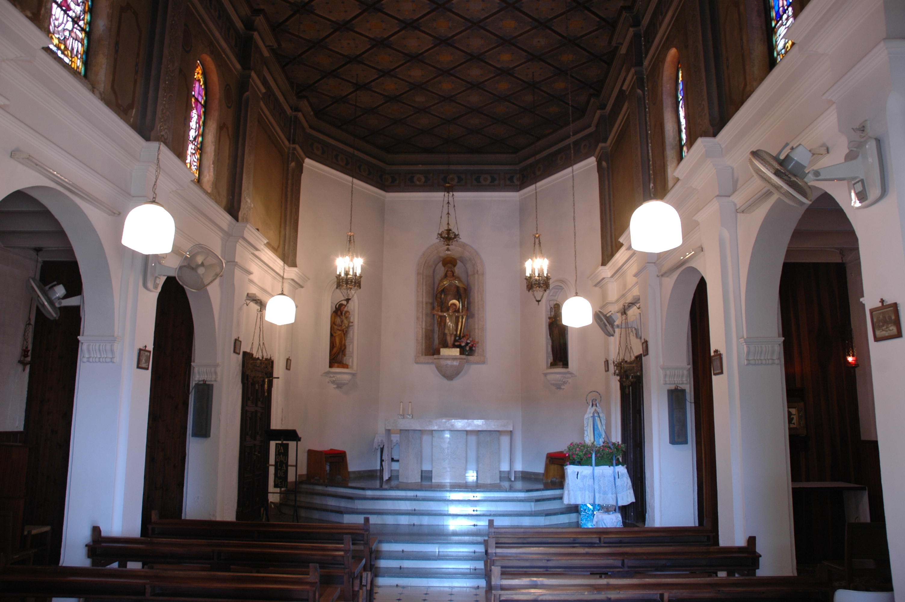 Blanes - Hospital Asil de Sant Jaume - Capella de Sant Jaume